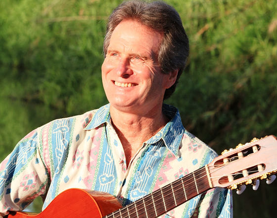 אורי הרפז - זמר, גיטריסט ומעבד - חבר "צמד הפרברים" המיתולוגי